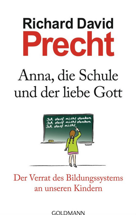 Richard David Precht: Anna, die Schule und der liebe Gott. Goldmann Verlag, München 2013. DNB